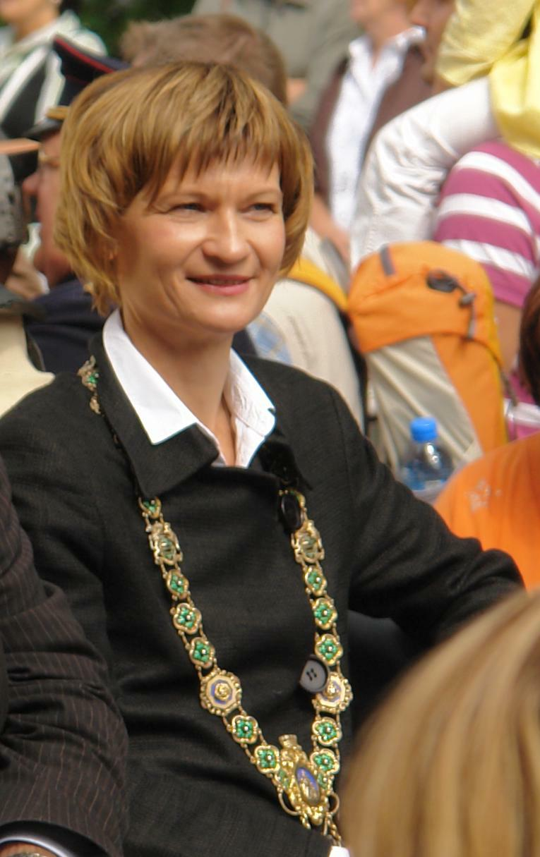 Oberbürgermeisterin von Chemnitz Barbara Ludwig während des Fest-Transports der Hartmann-Lok